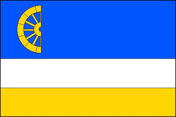 Vlajka obce Rádlo